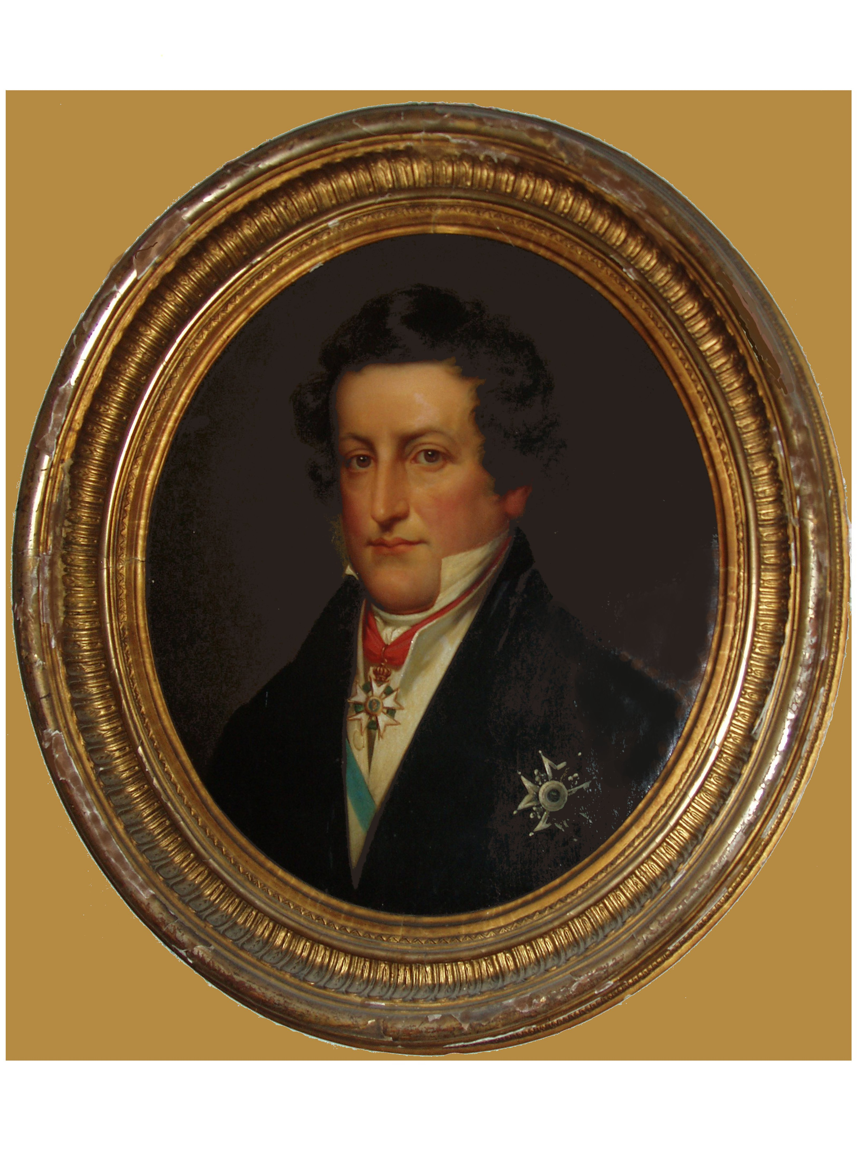 Porträt Graf (Conde) Juan Nepomuceno de Vial (* 1783; † 1835) spanischer Gesandter bei den Hansestädten (1826–1828), in Sachsen (1828–1830), im Osmanischen Reich (1831–1833) und im Vereinigten Königreich (1833–1834)